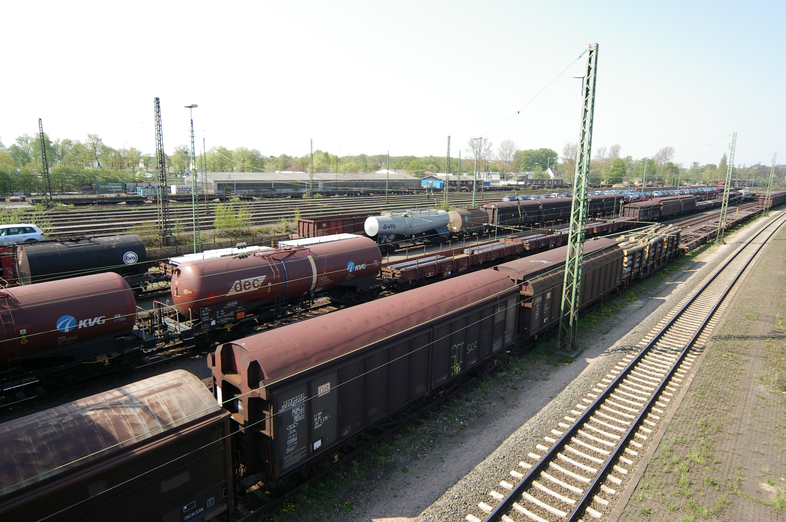 Güterwagen in Seelze (laut Titel)